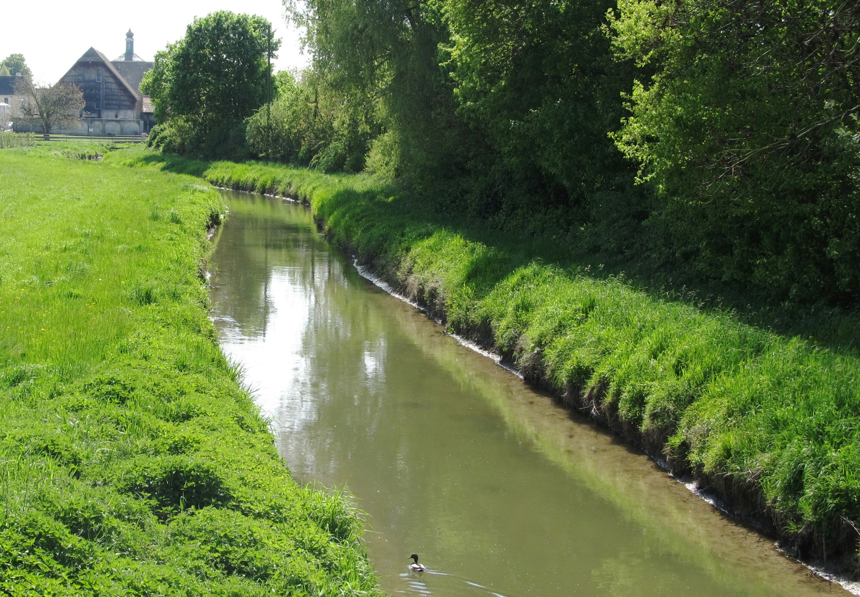 Kraichbach an der Kislauerstrasse in Bad Schönborn